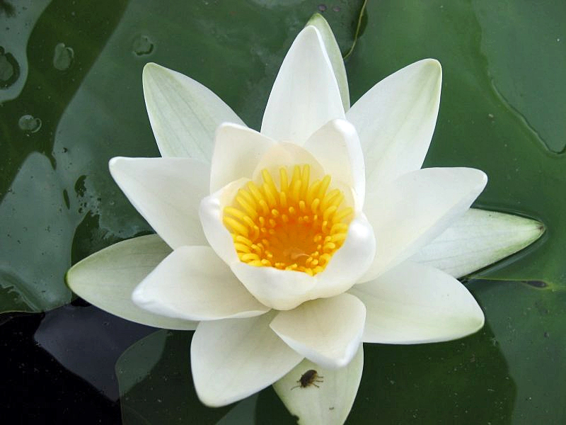 Weiße Seerose Nymphaea alba, Müritz-Gebiet